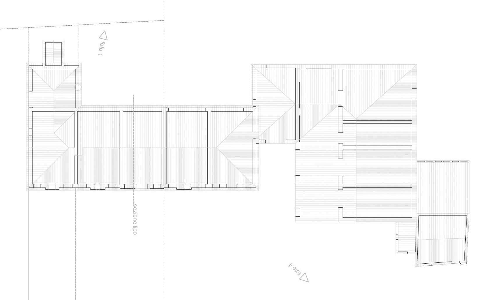 Planimetria della villa, fornita dall'Architetto Emanuele Ferrarese